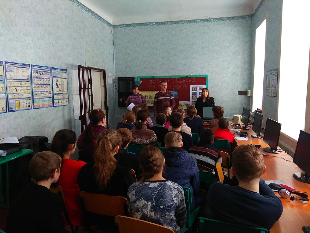 Просвітницька робота Софіївського МУВГ